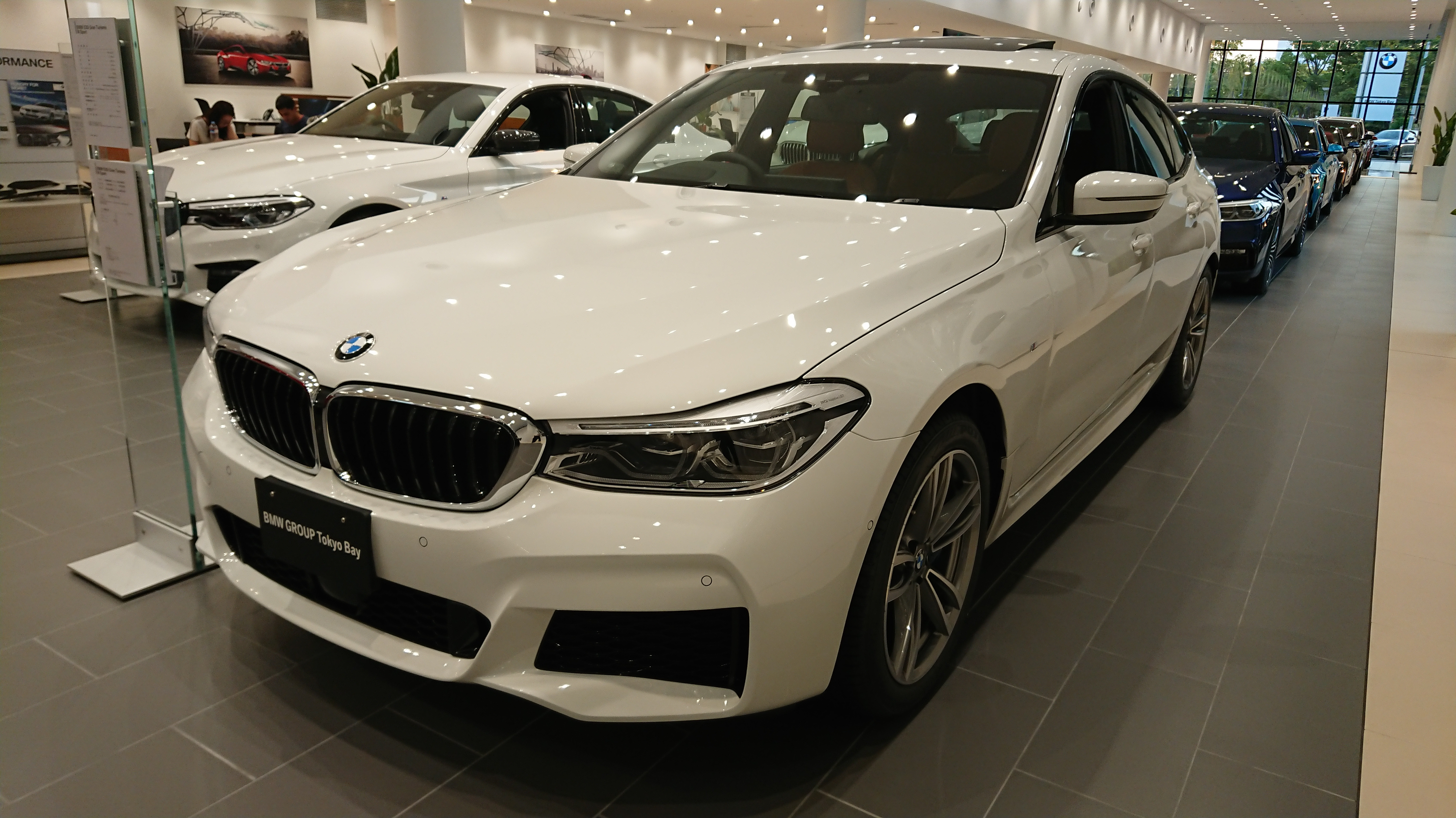 BMW 6シリーズ グランツーリスモ Mスポーツ（フロント）